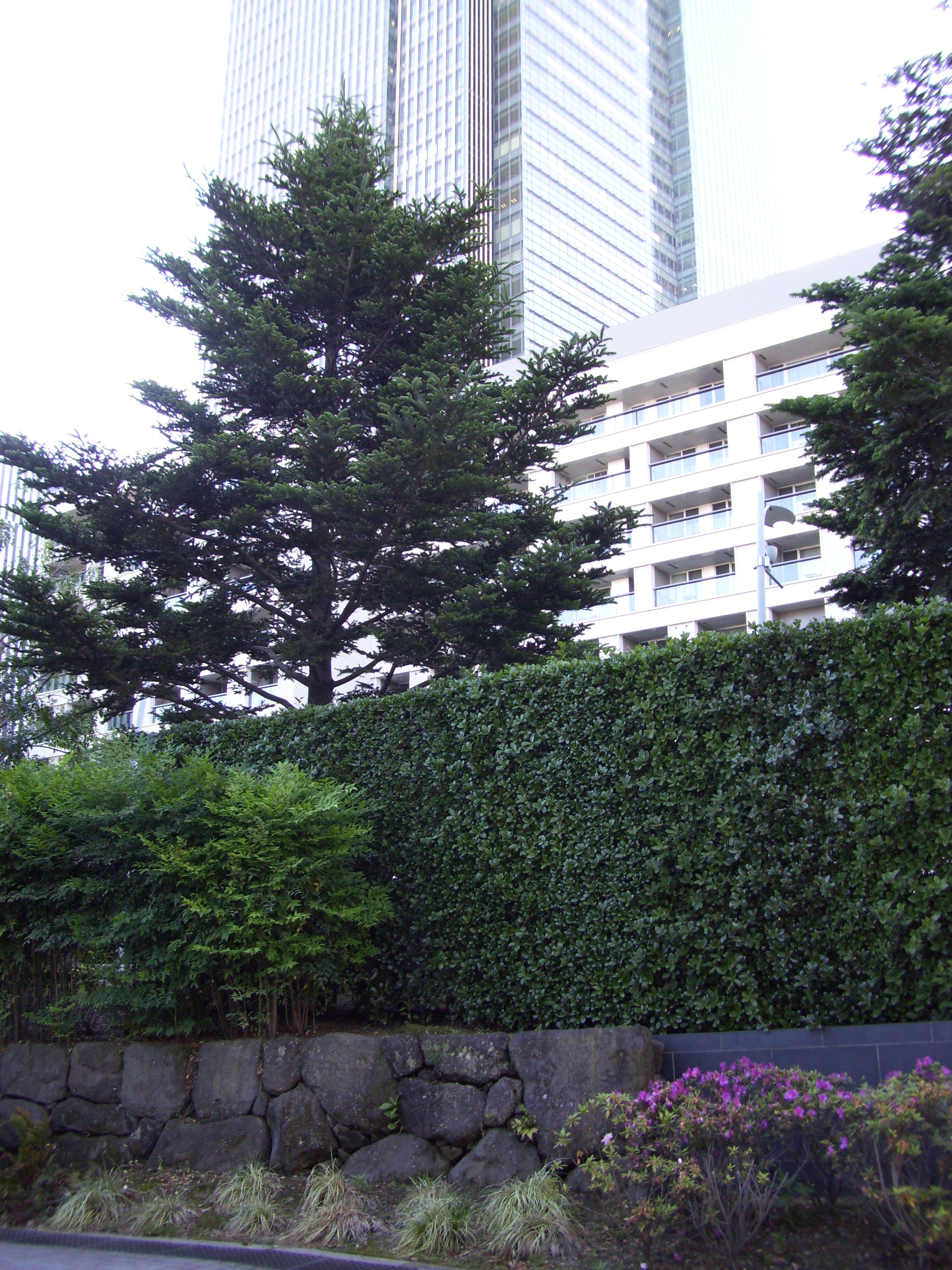 東京ミッドタウン（背後の高層ビル）外周堰堤部の石垣は事前の発掘調査で出土した長州毛利家上屋敷で使われていた遺構を再利用したもの